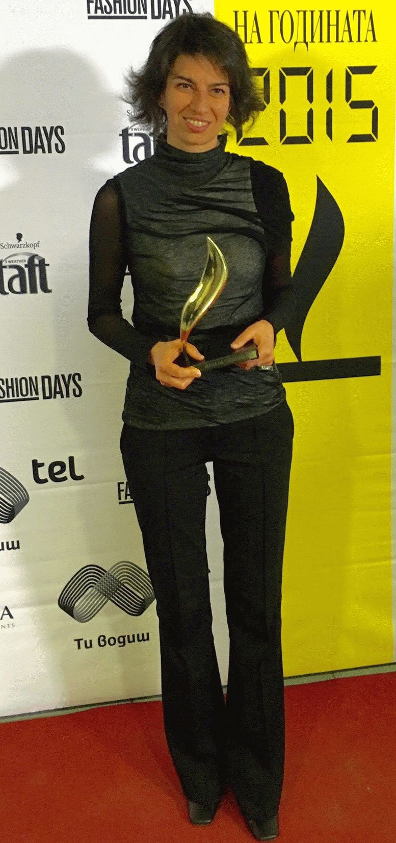 Elica Panajotova